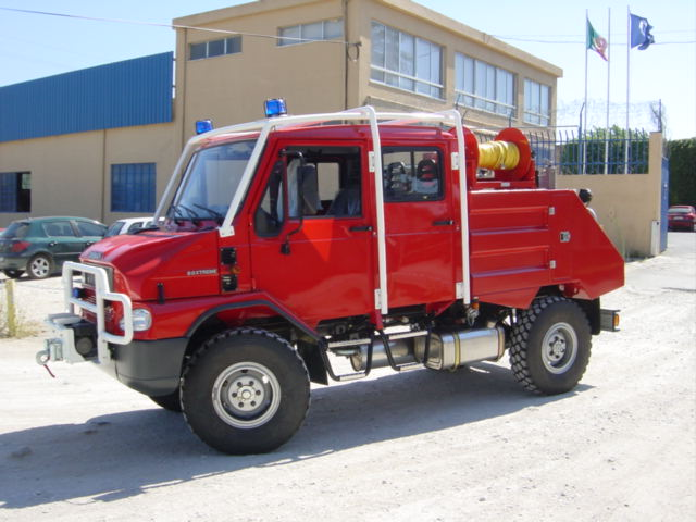 BREMACH destinato ad uso della categoria VIGILI DEL FUOCO